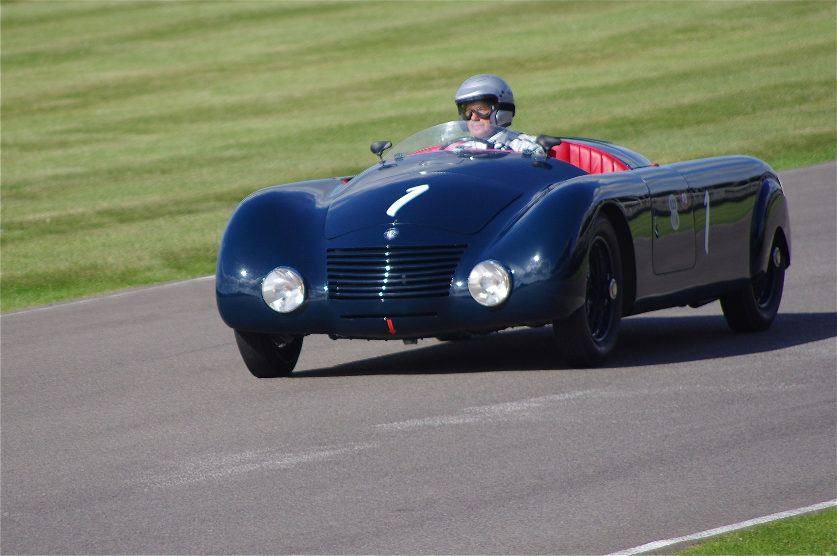 Goodwood Revival 2012